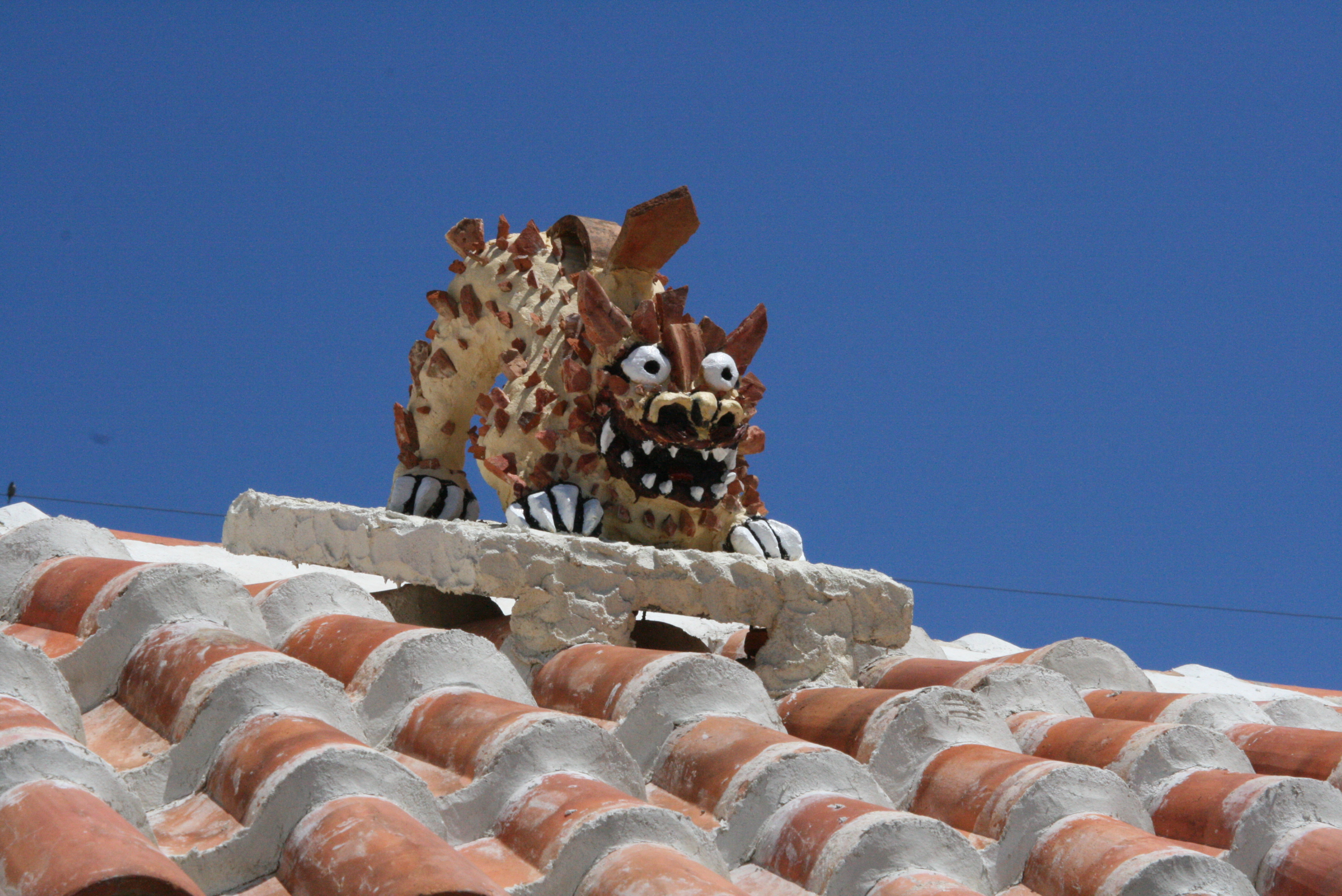 沖縄本島名護市のシーサー